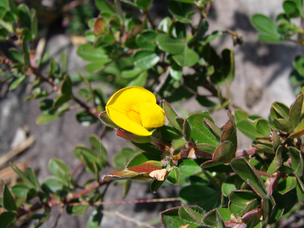 Zornia flemmingioides Moric. - FABACEAE - Parque Nacional da Chapada Diamantina - Palmeiras - Bahia - Brasil.